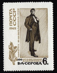 Портрет Ф.И.Шаляпина на марке СССР 1965 г. , посвященной 100-летию со дня рождения художника Серов В.А.